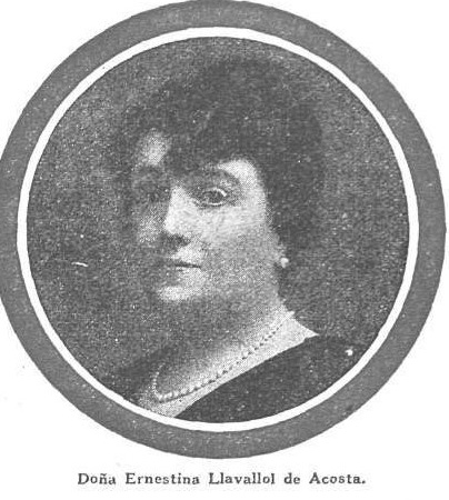 María Ernestina Gertrudis Llavallol Ortiz Basualdo (1871-1956), filántropa argentina.